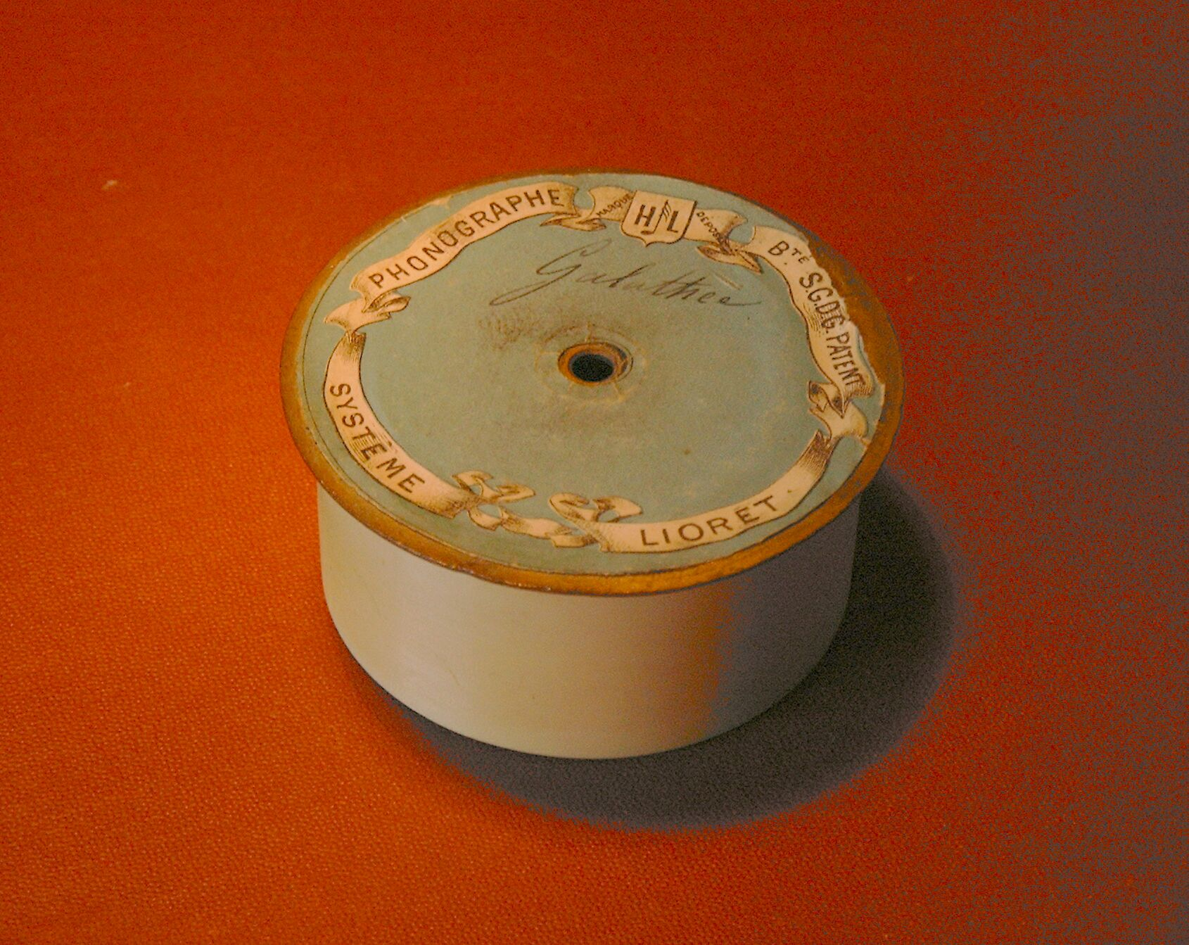 Foto einer von Henri Lioret gefertigten Zelluloidwalze aus dem Jahre 1894